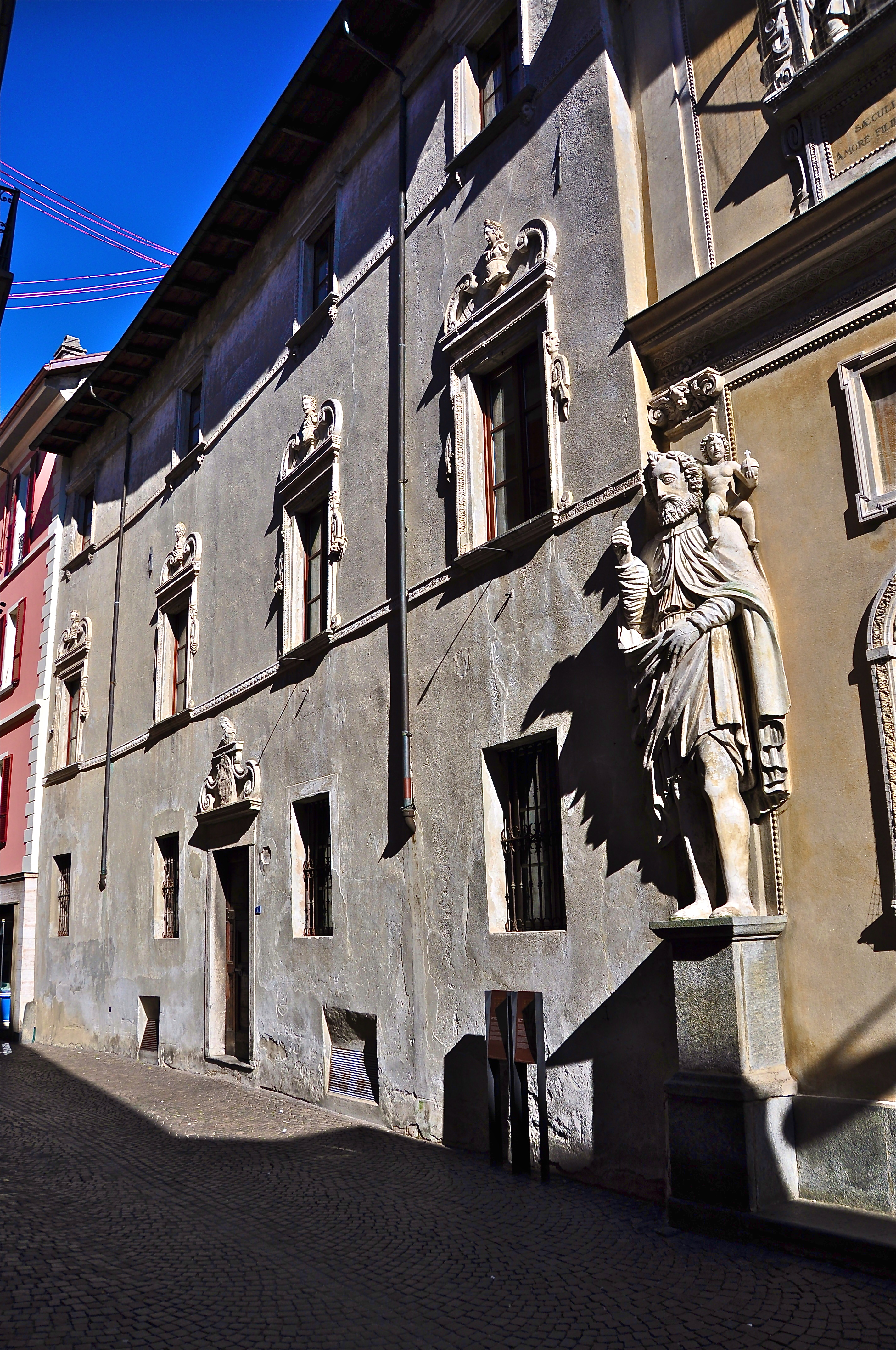 Veduta della casa dei Canonici sul lato meridionale in via Cittadella, Locarno